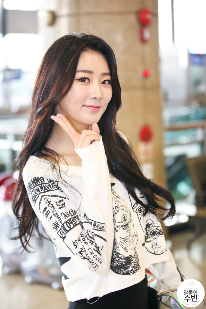 150808 김포공항